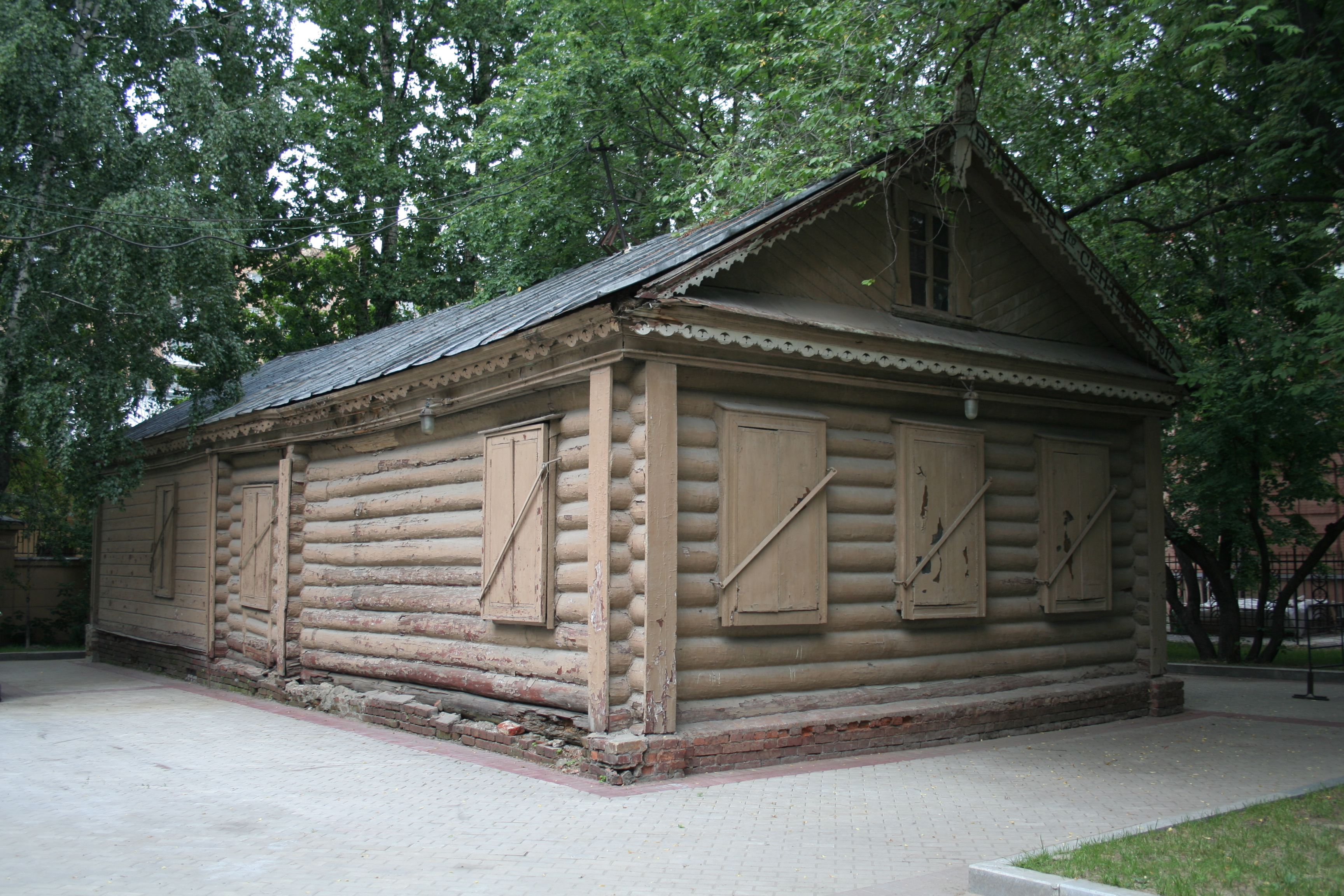 Восстановленная в XIX в. «Кутузовская изба» в Филях